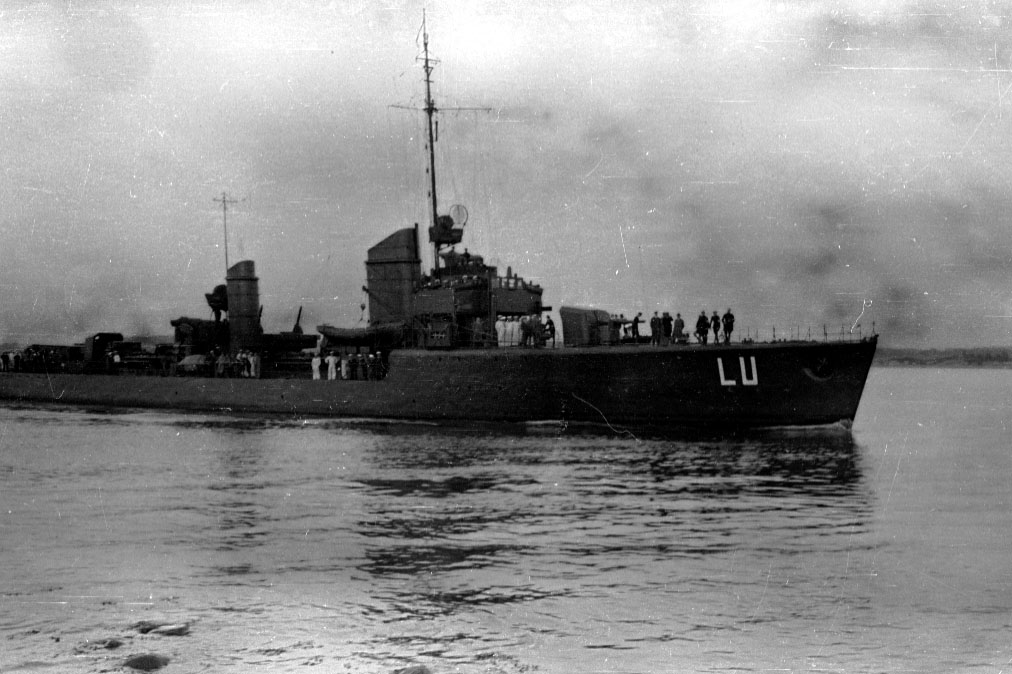 Torpedoboot Luchs (Typ 24) im Juni 1934 bei Neustadt/Holstein.